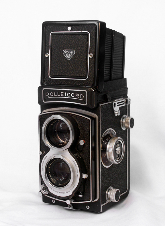 Rolleicord Vb medium format camera, c. 1970.